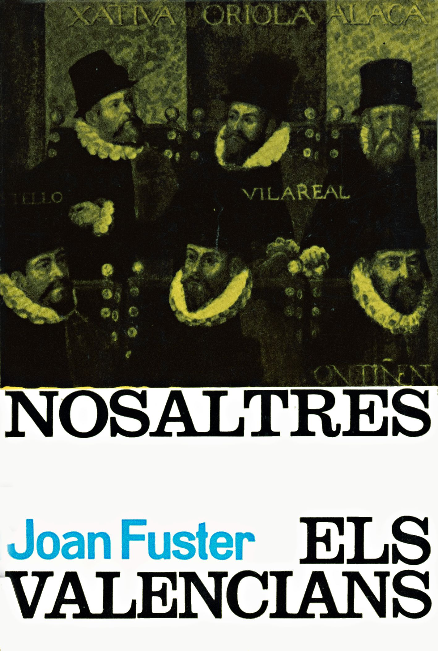 Portada de la primera edició de "Nosaltres els valencians".